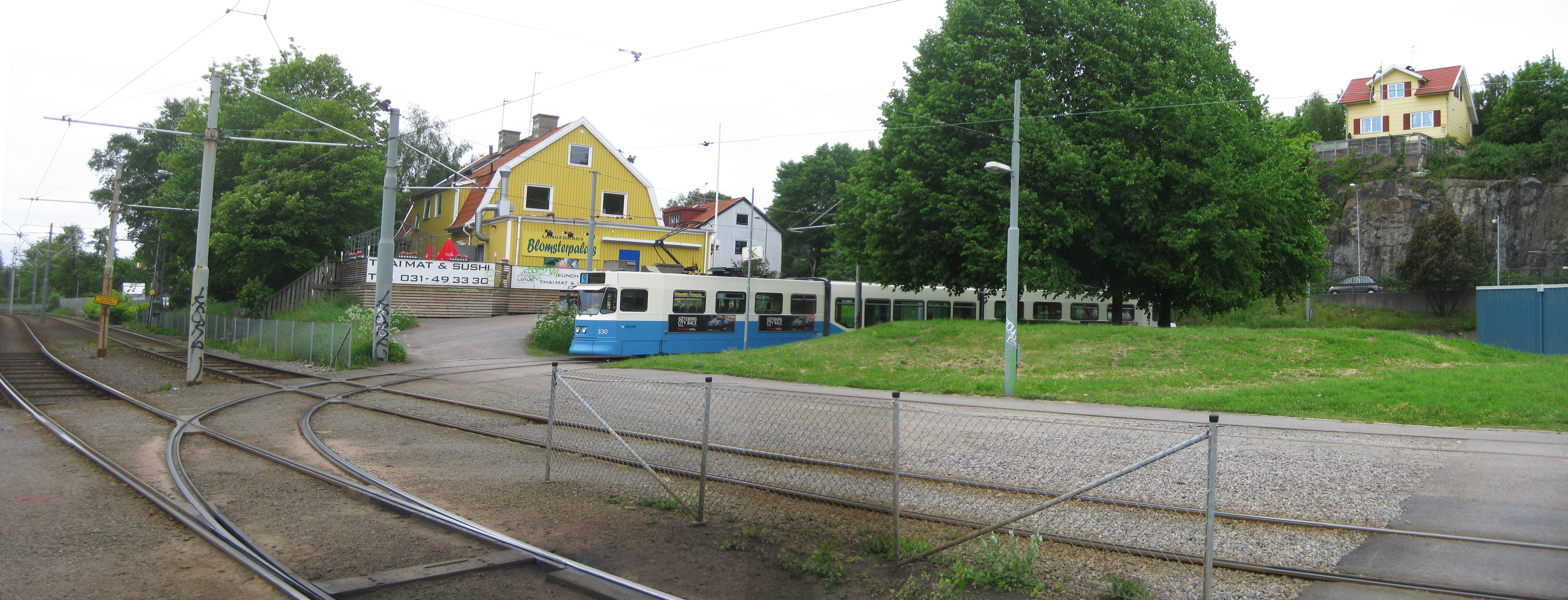 Vändslingan vid Kunggstens spårvagnshållplats, Göteborg.